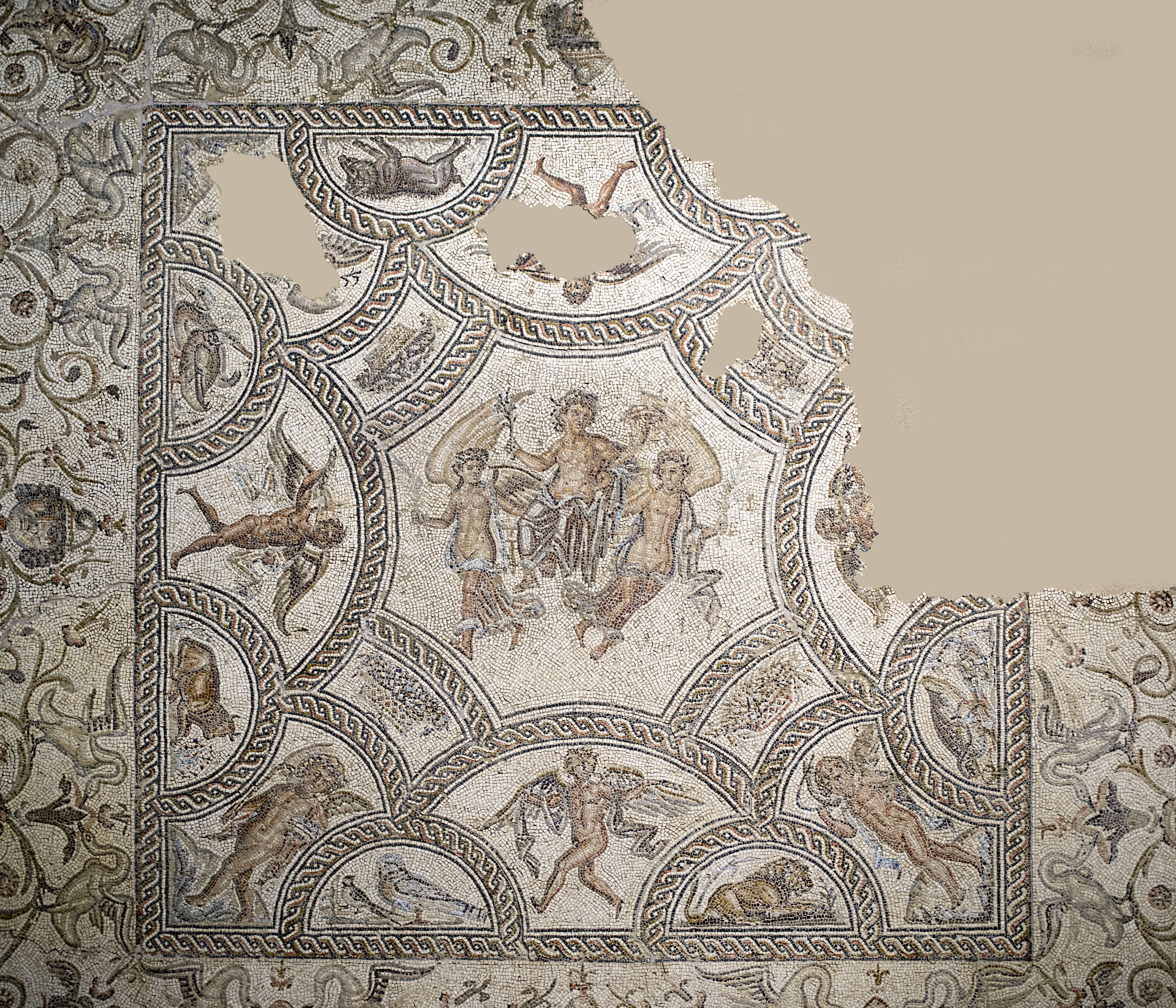 Mosiaco de grandes dimensiones que se encontró bajo la calle Miguel de Cervantes de Écija, Sevilla, en el año 2003. Está datado en la segunda mitad del siglo II o primeros del III. Se expone en el Museo Histórico Municipal de Écija. Descargable en alta resolución.